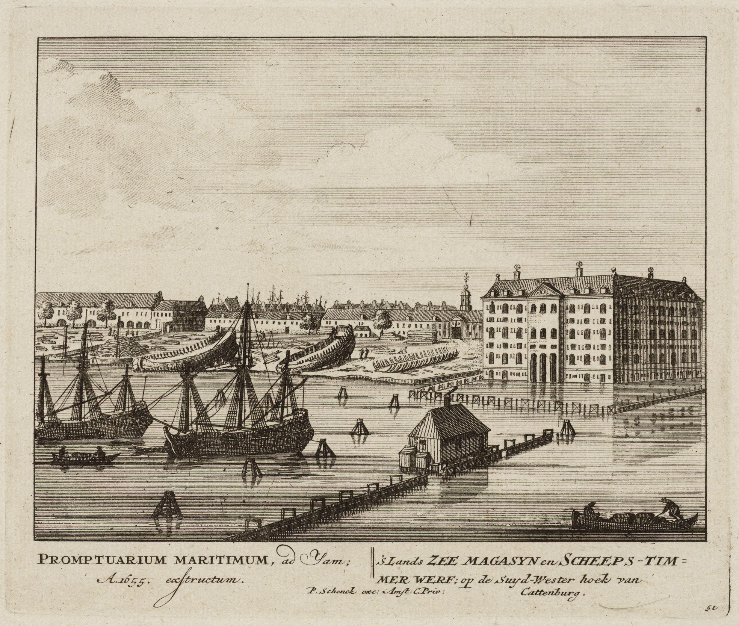 Beschrijving s Lands Zee Magasyn en Scheeps-Timmer Werf; op de Suyd-Wester hoek van Cattenburg 's Lands Zeemagazijn en de Admiraliteitswerf op Kattenburg, gezien over de IJgracht. Ets. Documenttype prent Vervaardiger Schenk, Pieter (1660-1713) Collectie Collectie Atlas Dreesmann Datering 1710 ca. Geografische naam Kattenburg IJgracht Inventarissen Afbeeldingsbestand 010094002885